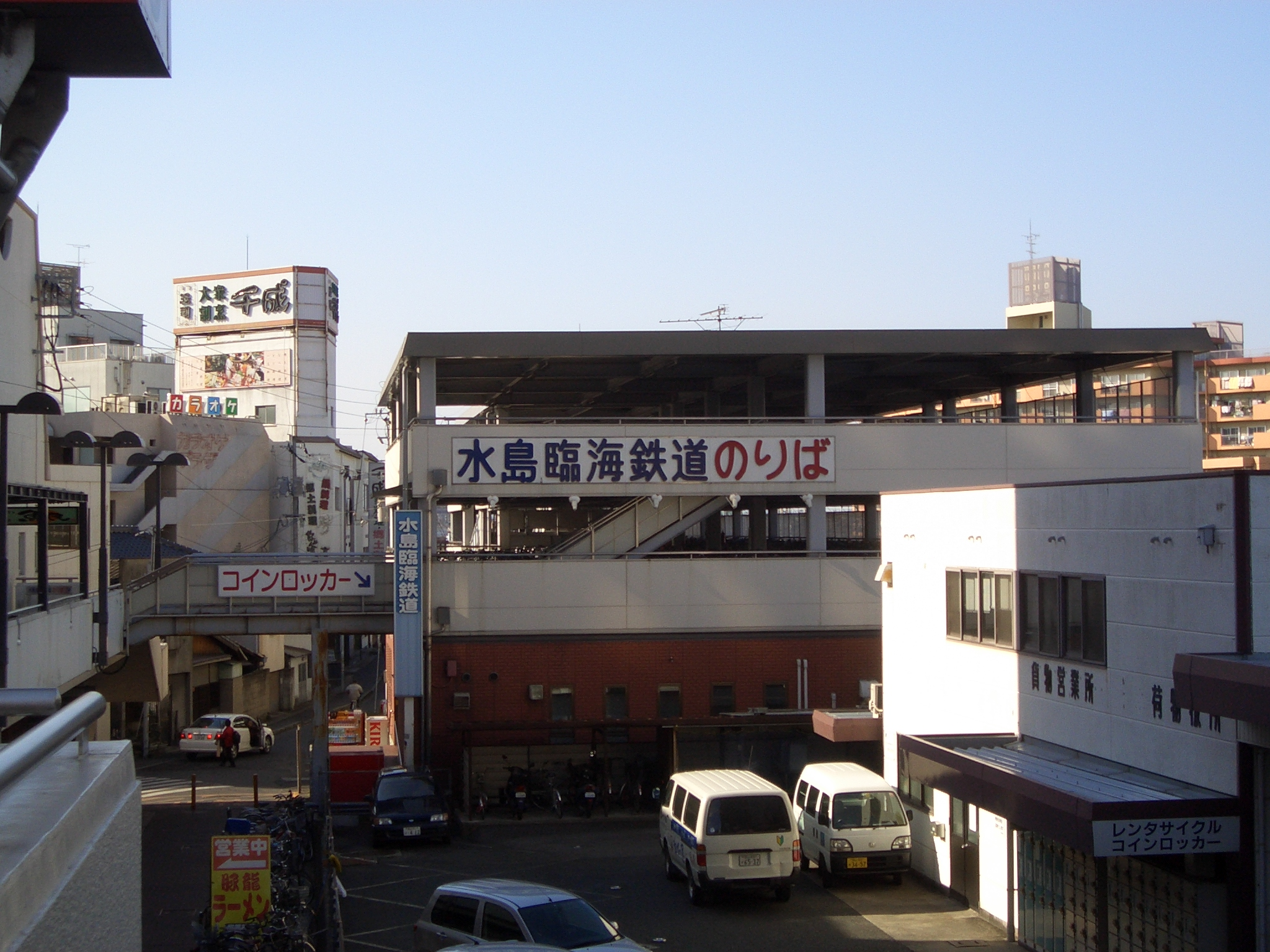 倉敷市駅水島臨海鉄道のりば（岡山県倉敷市阿知1-1-2）